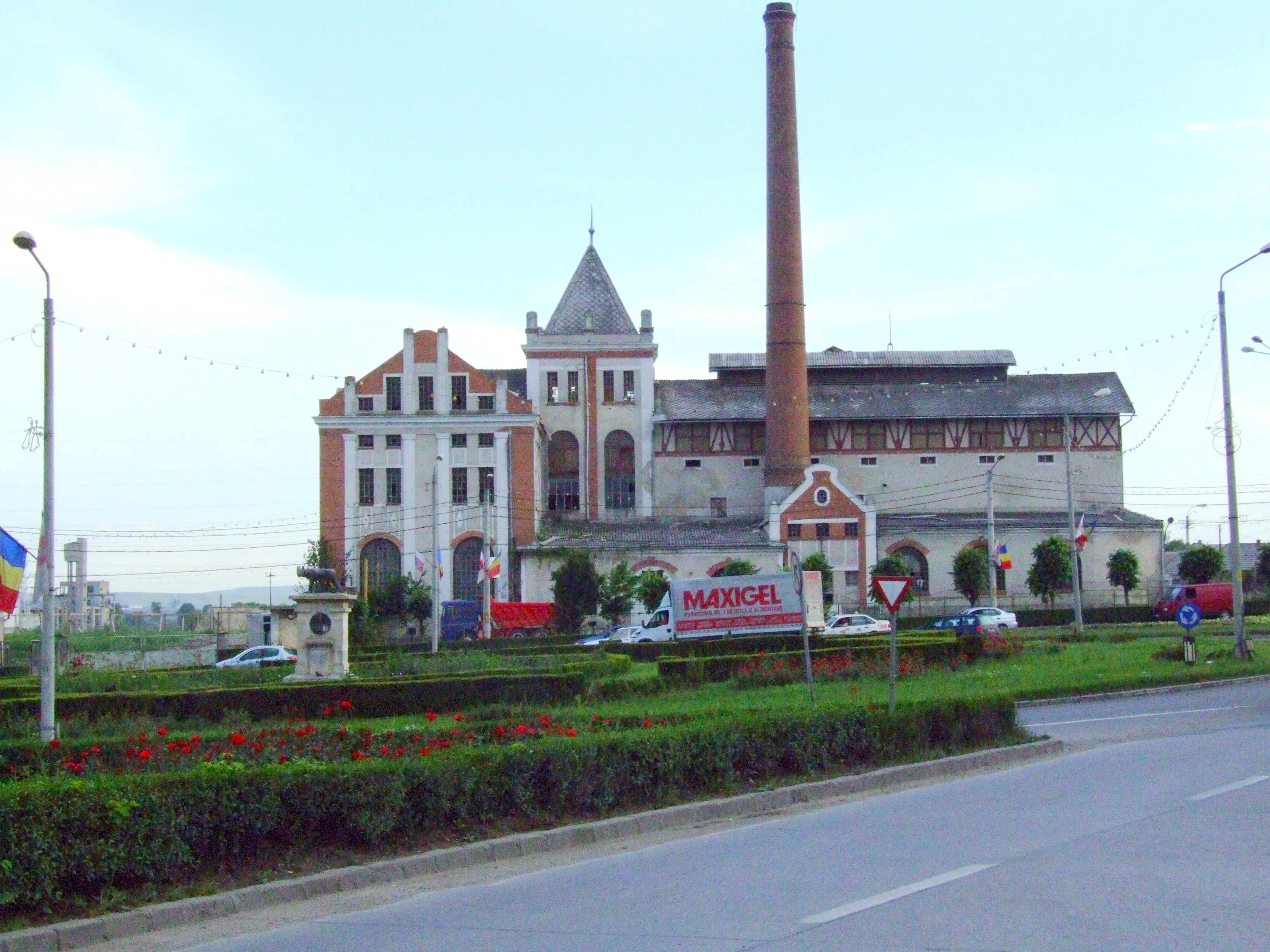 Fabrica de Bere CJ-II-m-B-07787